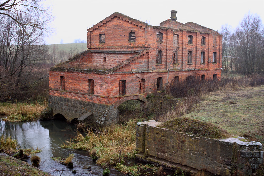 Беларуская (тарашкевіца): Вадзяны млын XIX стагодзьдзе каля дарогі Талачын — Круглае This is a photo of Belarusian heritage monument. Reference number: 213Г000885 ( WLM)